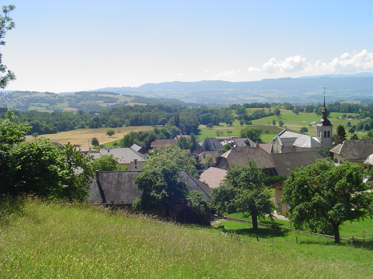 Centre de Viuz depuis le chemin du Chalet